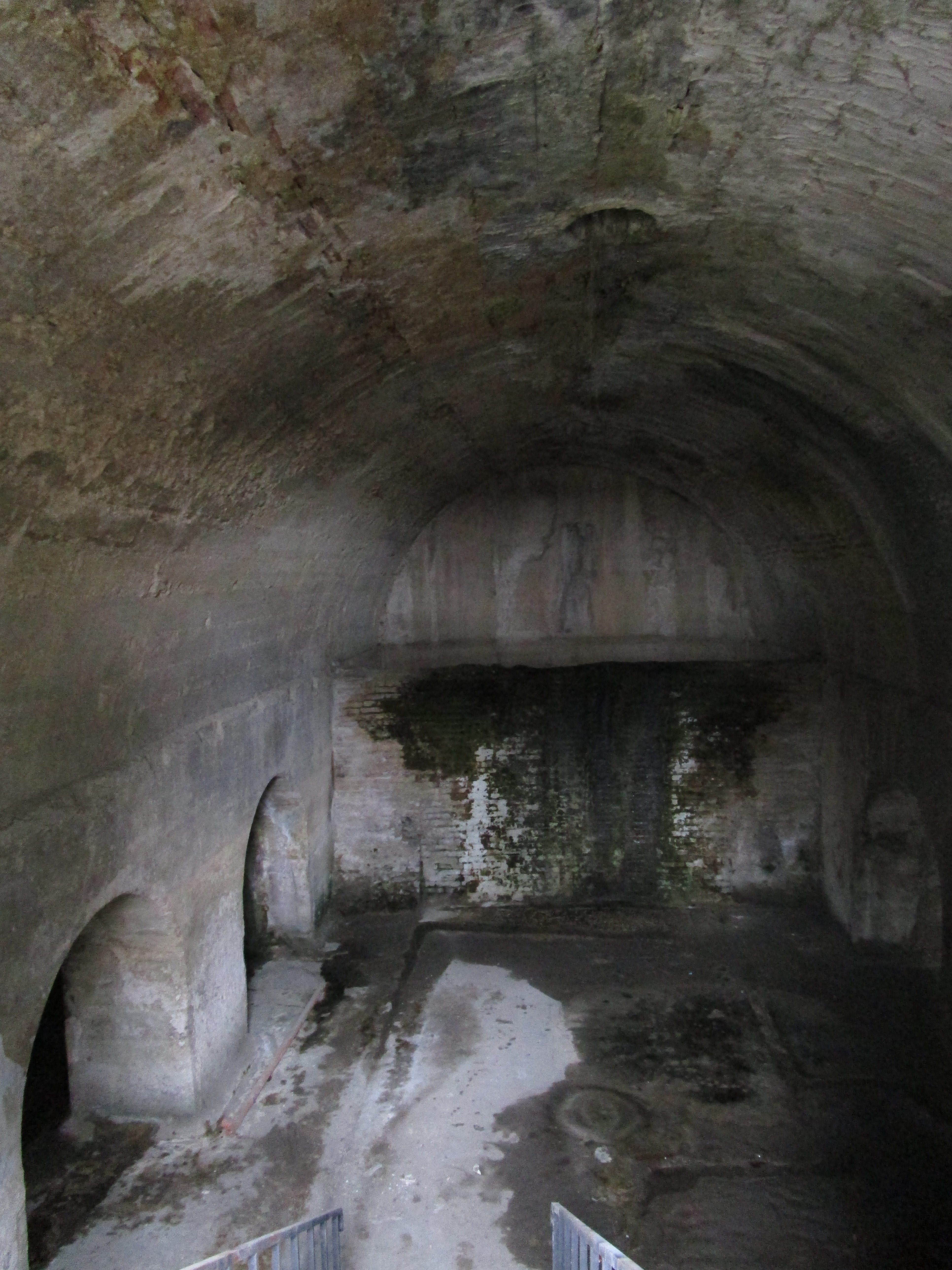 Cisterna utilizzata per alimentare le terme romane nell'antica Teate Marrucinorum